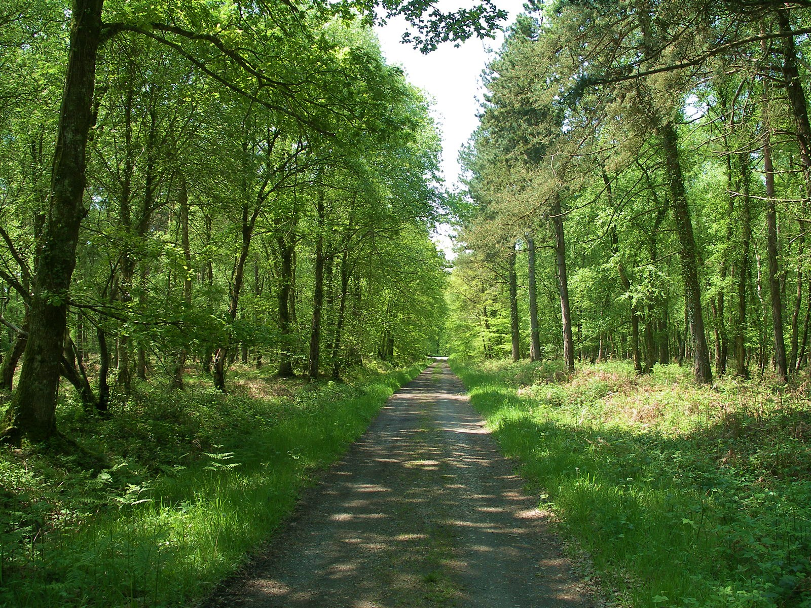 Route forestière de la Chênesse, forêt de Cerisy, Montfiquet, Calvados